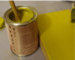 Lackfarbtopf